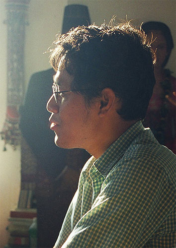 Budiman Sudjatmiko, 2002